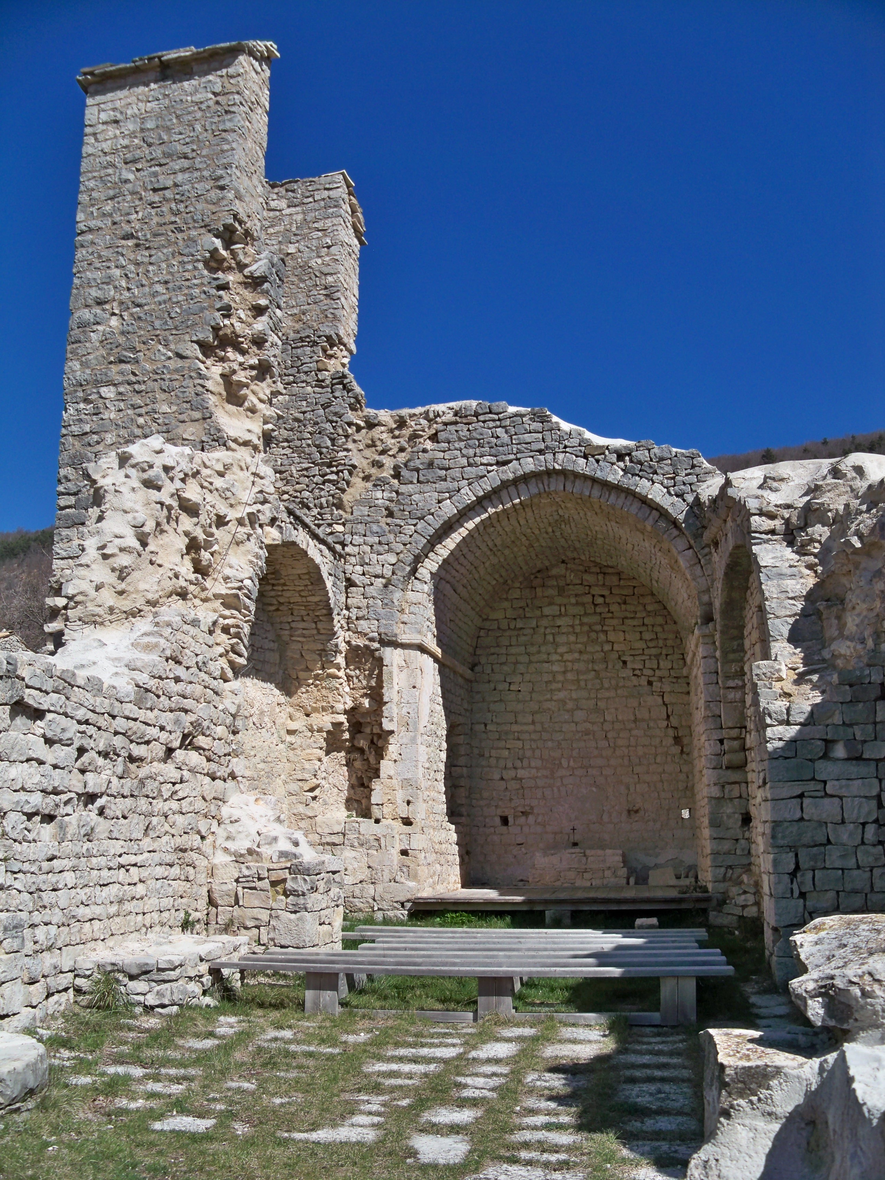 église de Vière,La Rochegiron (04)